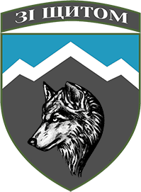 Нарукавний знак, 8 окремий гірсько-штурмовий батальйон